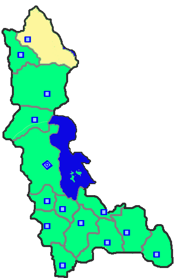 شهرستان ماکو